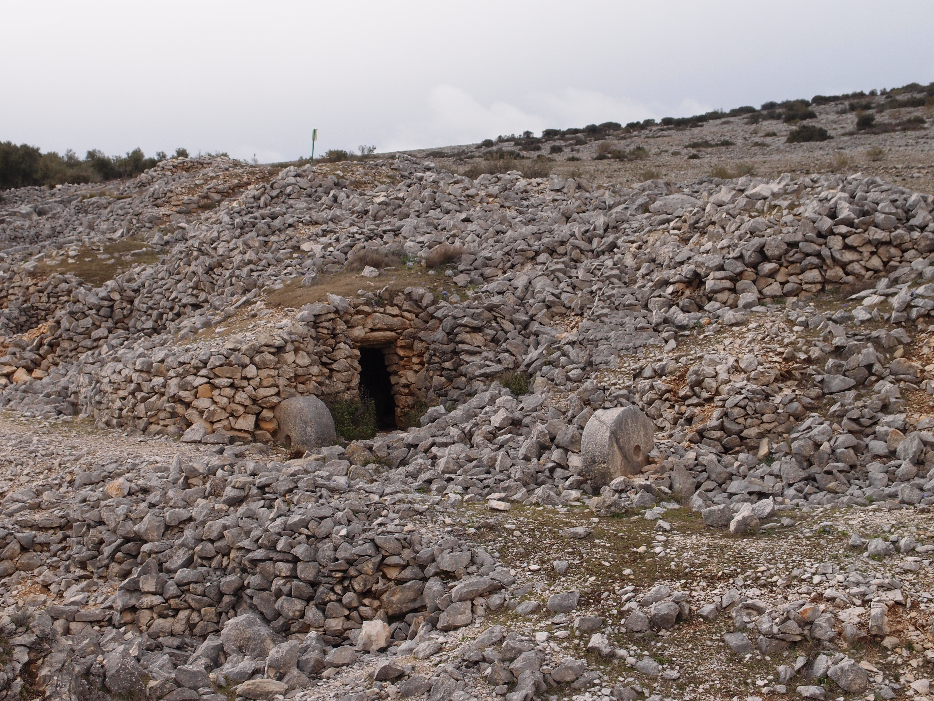 Vista de Los Caracoles, Parque Natural de Sierra Mágina.